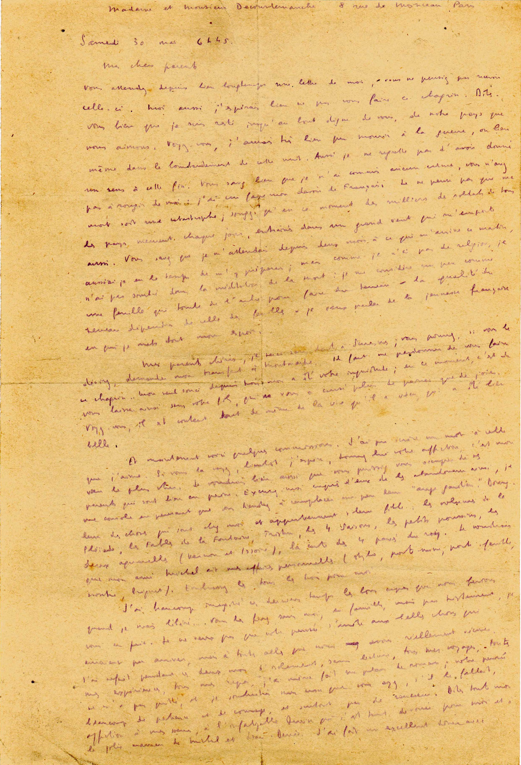 Lettre de Jacques Decour à son épouse et à sa fille, datée du samedi 30 mai 1942, recto.